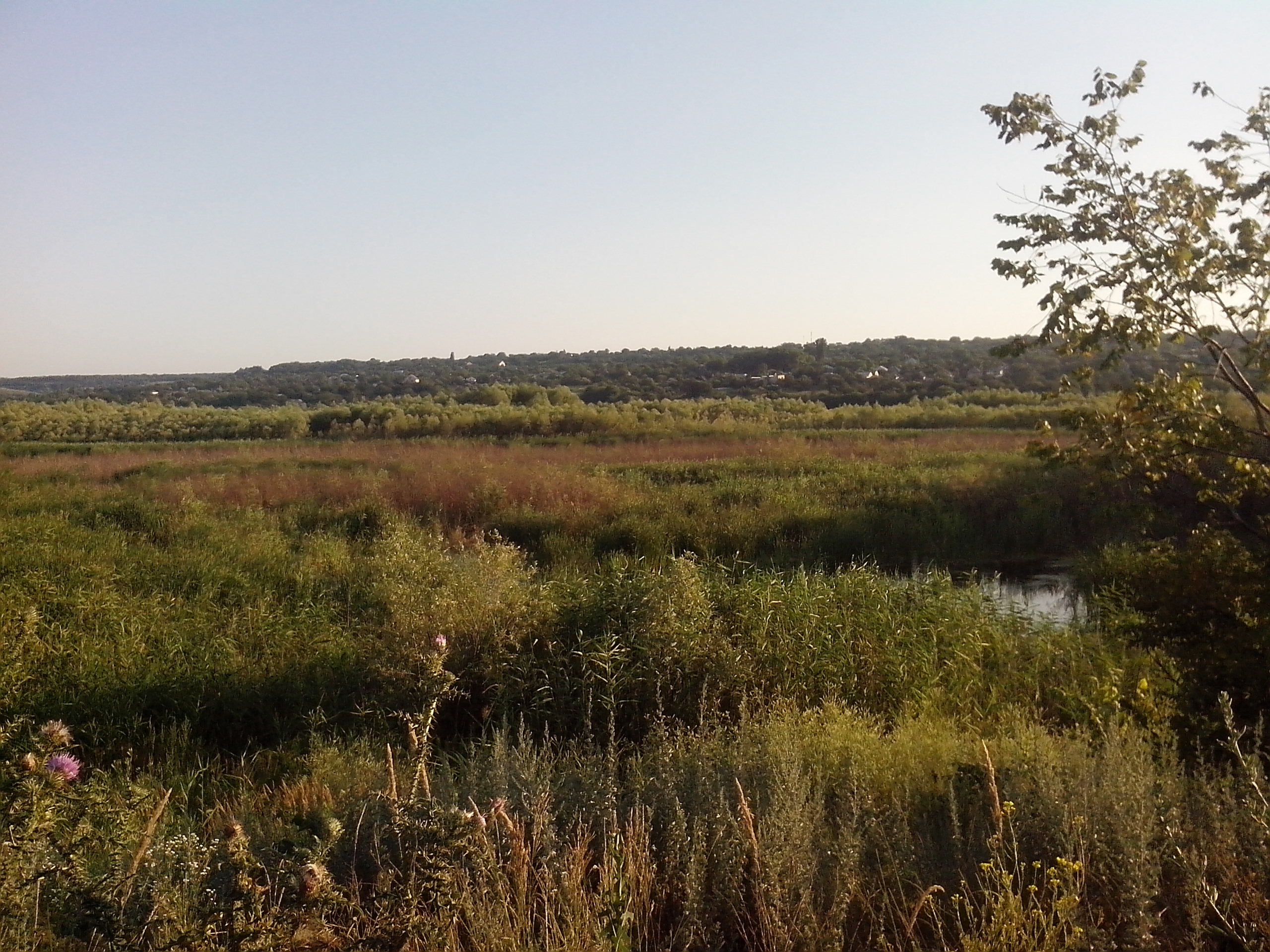 Пейзажі Караухівки